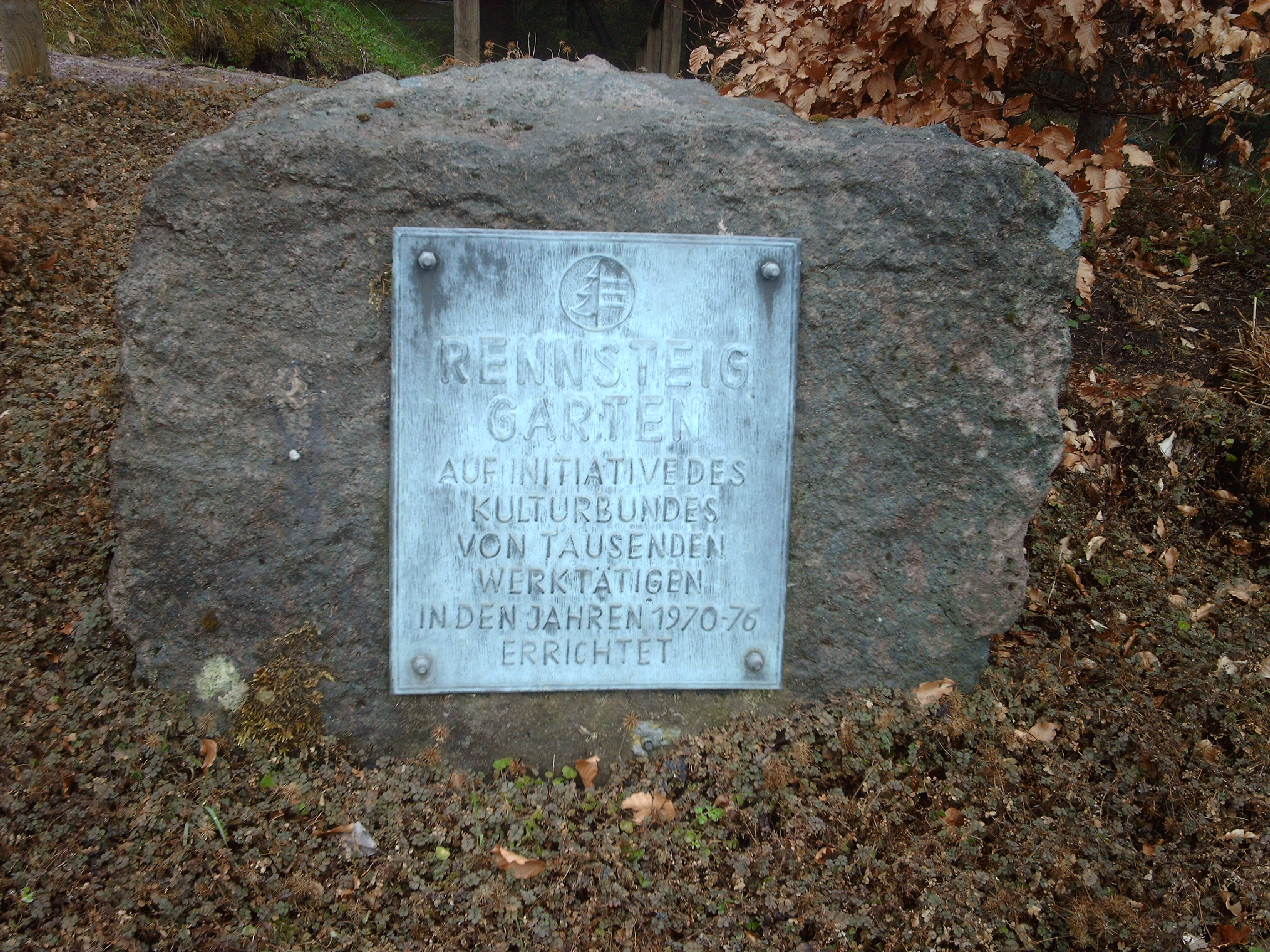 Gedenktafel zur Errichtung des Rennsteiggartens in Oberhof.